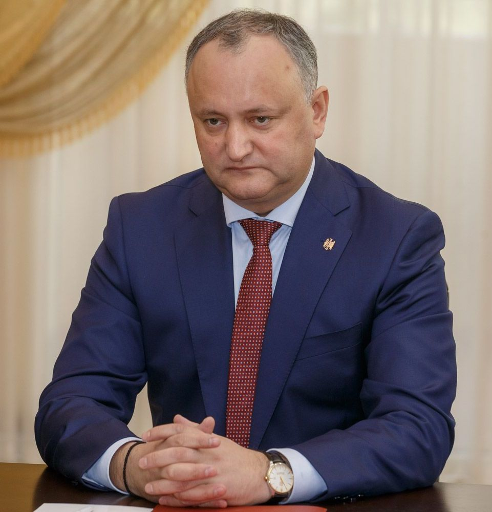 Игорь Николаевич Додон (род. 1975) — молдавский государственный и политический деятель. Президент Республики Молдова